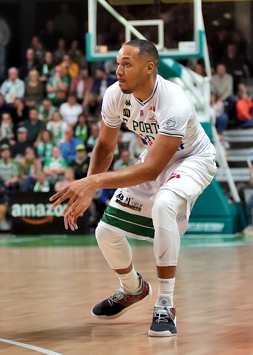 ODN02582